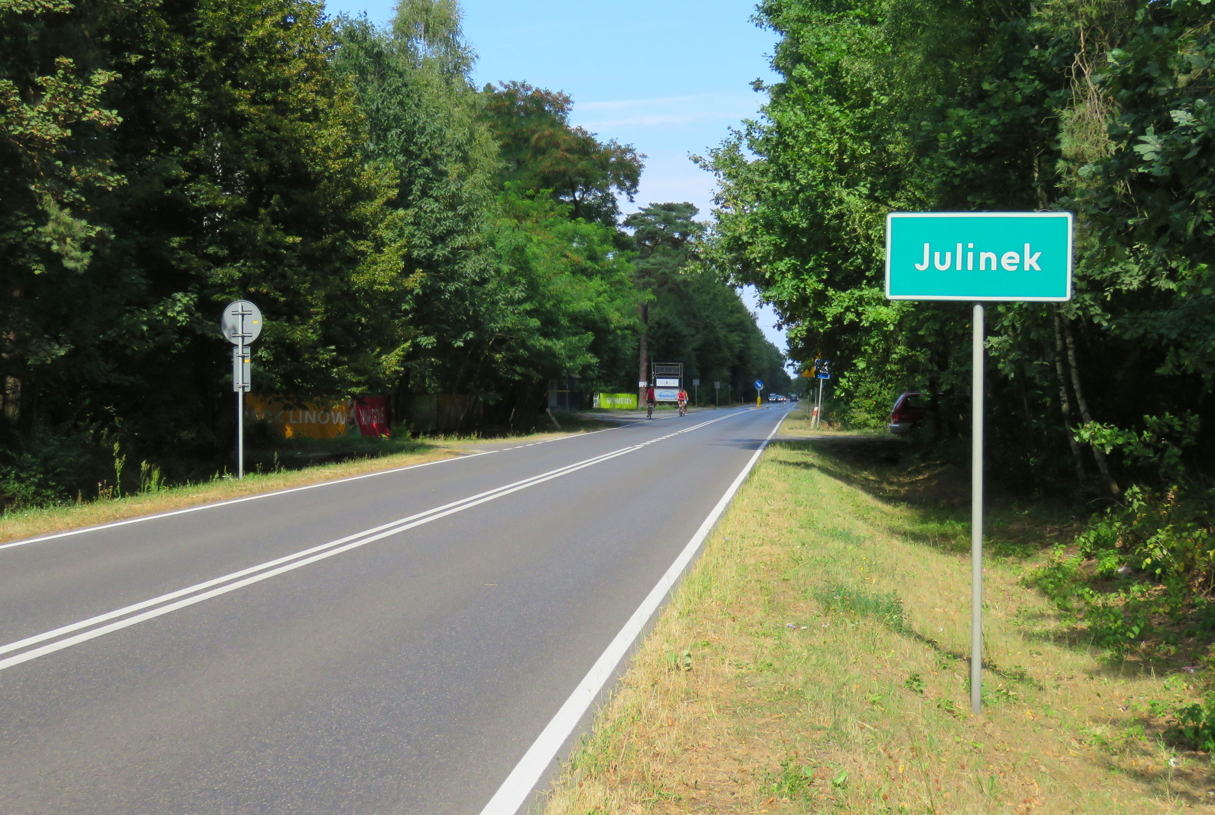 Julinek, gmina Leszno